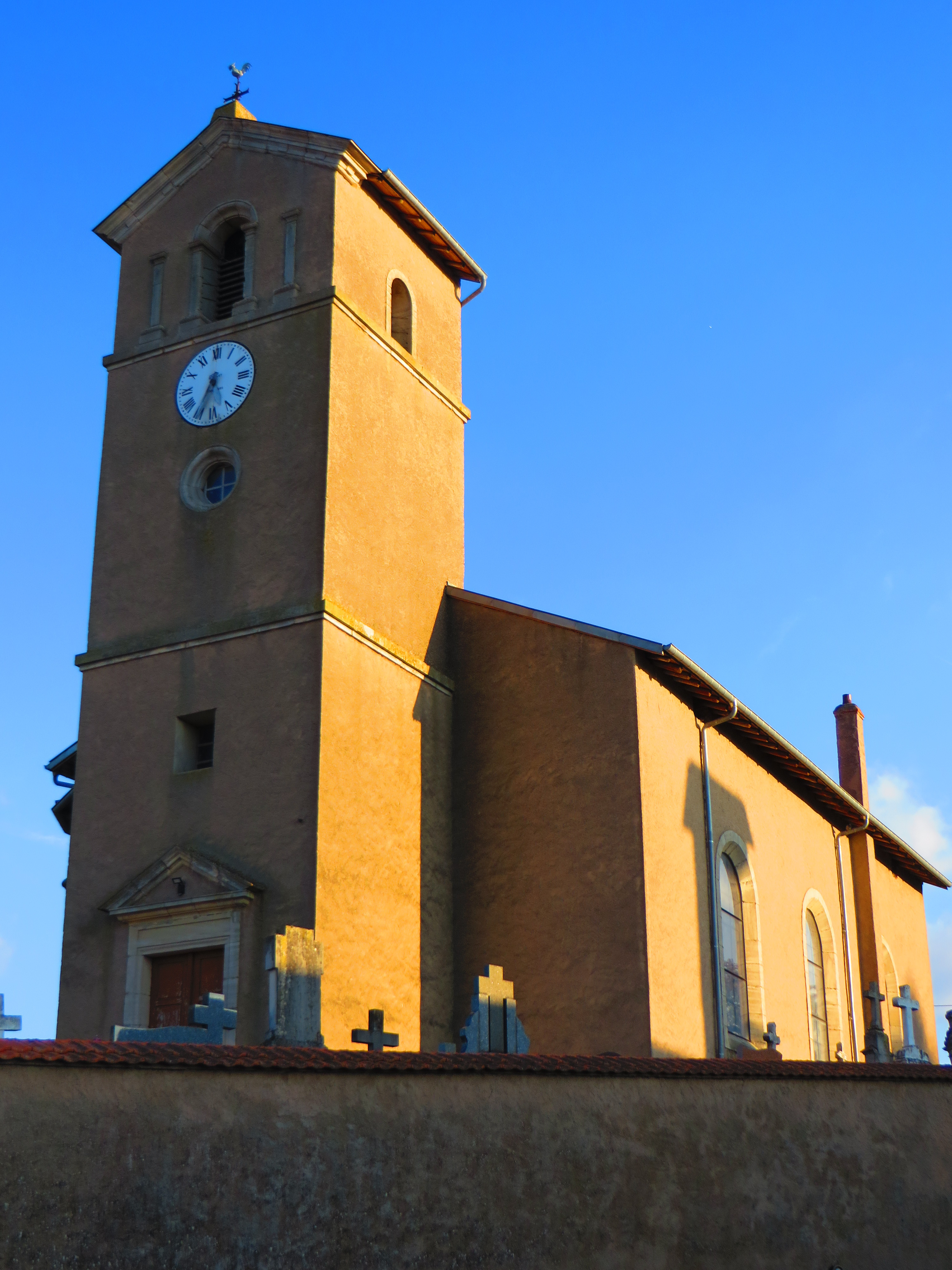 Burlioncourt l'église Saint-Léger